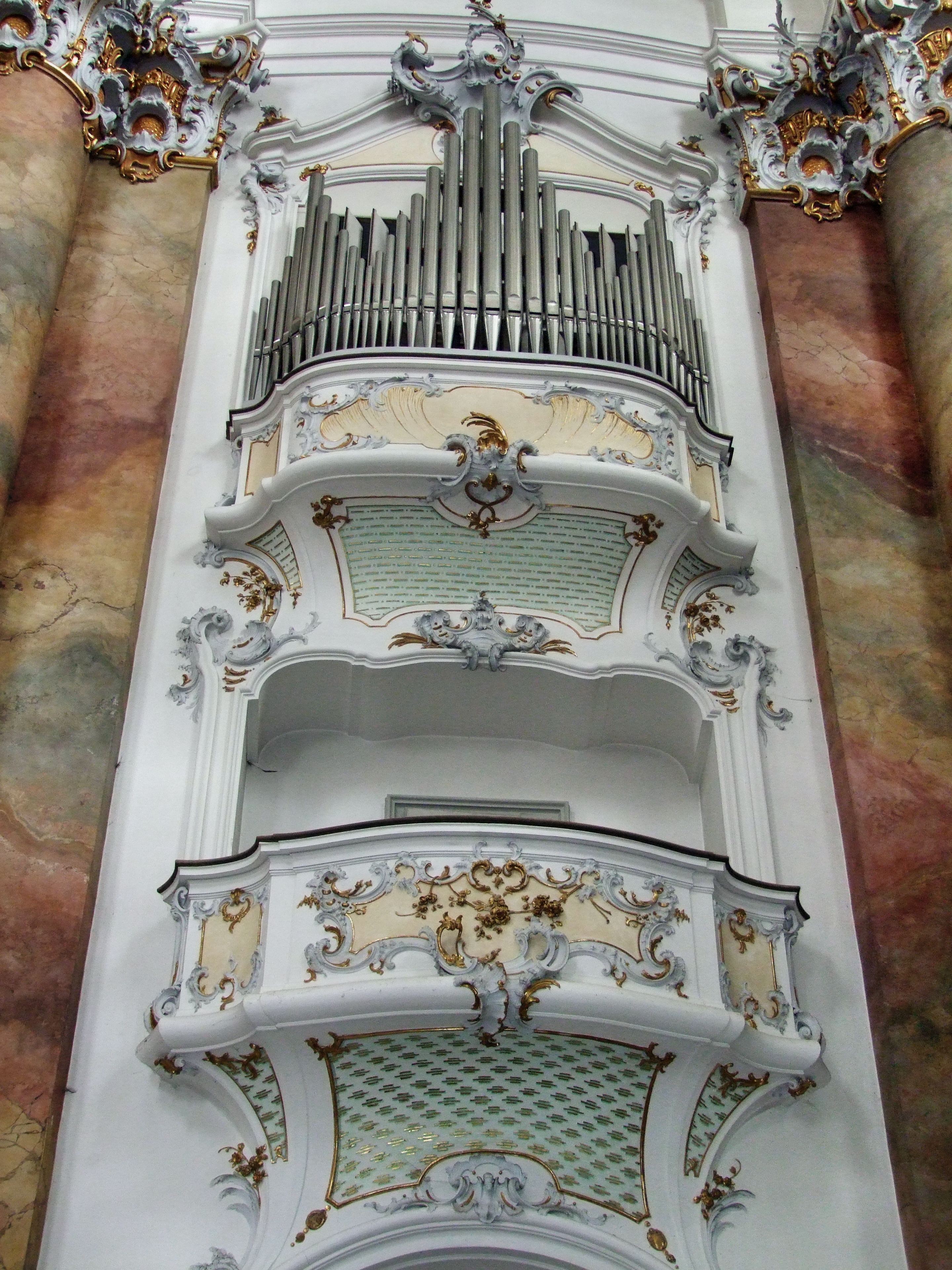 Balkon und ein Teil des Prospekts der Marienorgel an der Innenwand des östlichen Turms, Basilika Ottobeuren